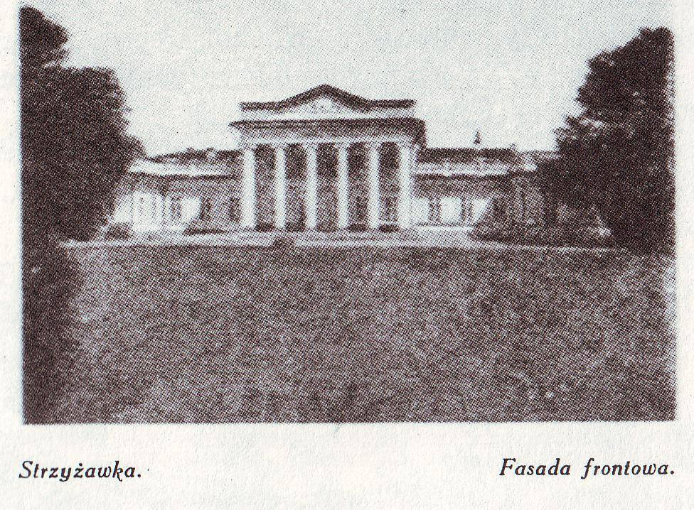 Strzyżawka